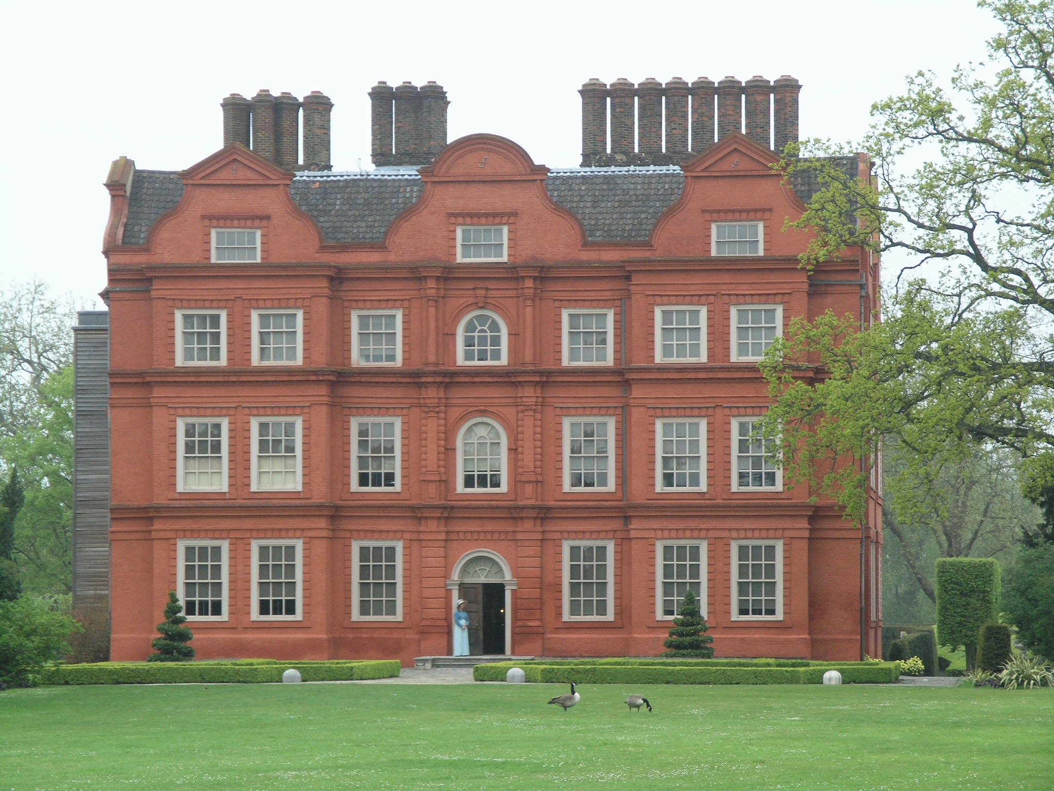 Kew Gardens, London